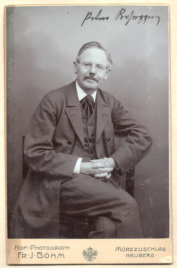 Peter Rosegger, Porträtfotografie mit eigenhändigem Namenszug und einem Spruch „Gütig und treu“, um 1906